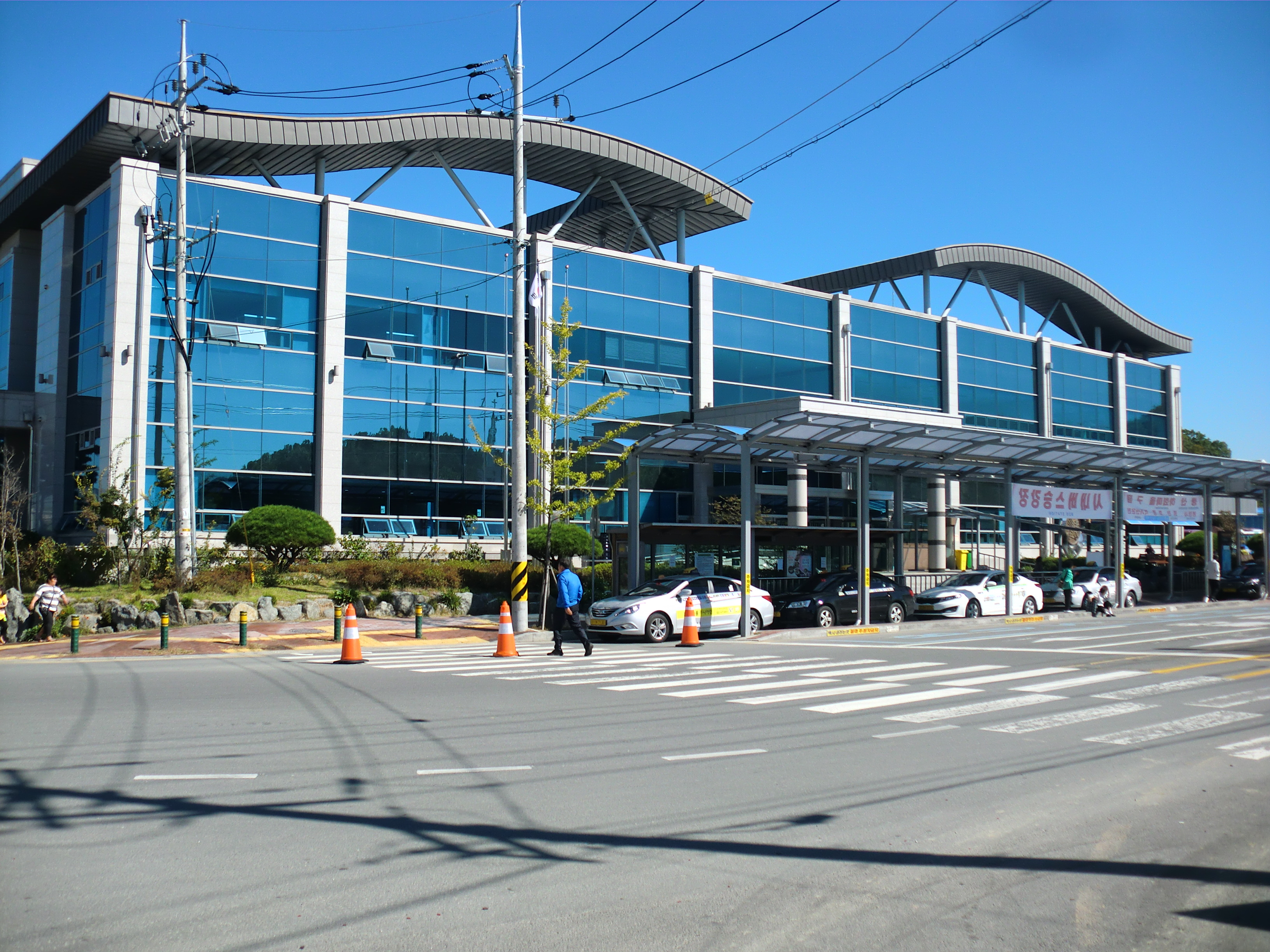 경상북도 안동시에 있는 안동시외버스터미널